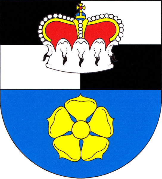 Znak obce Písečné (okres Jindřichův Hradec)